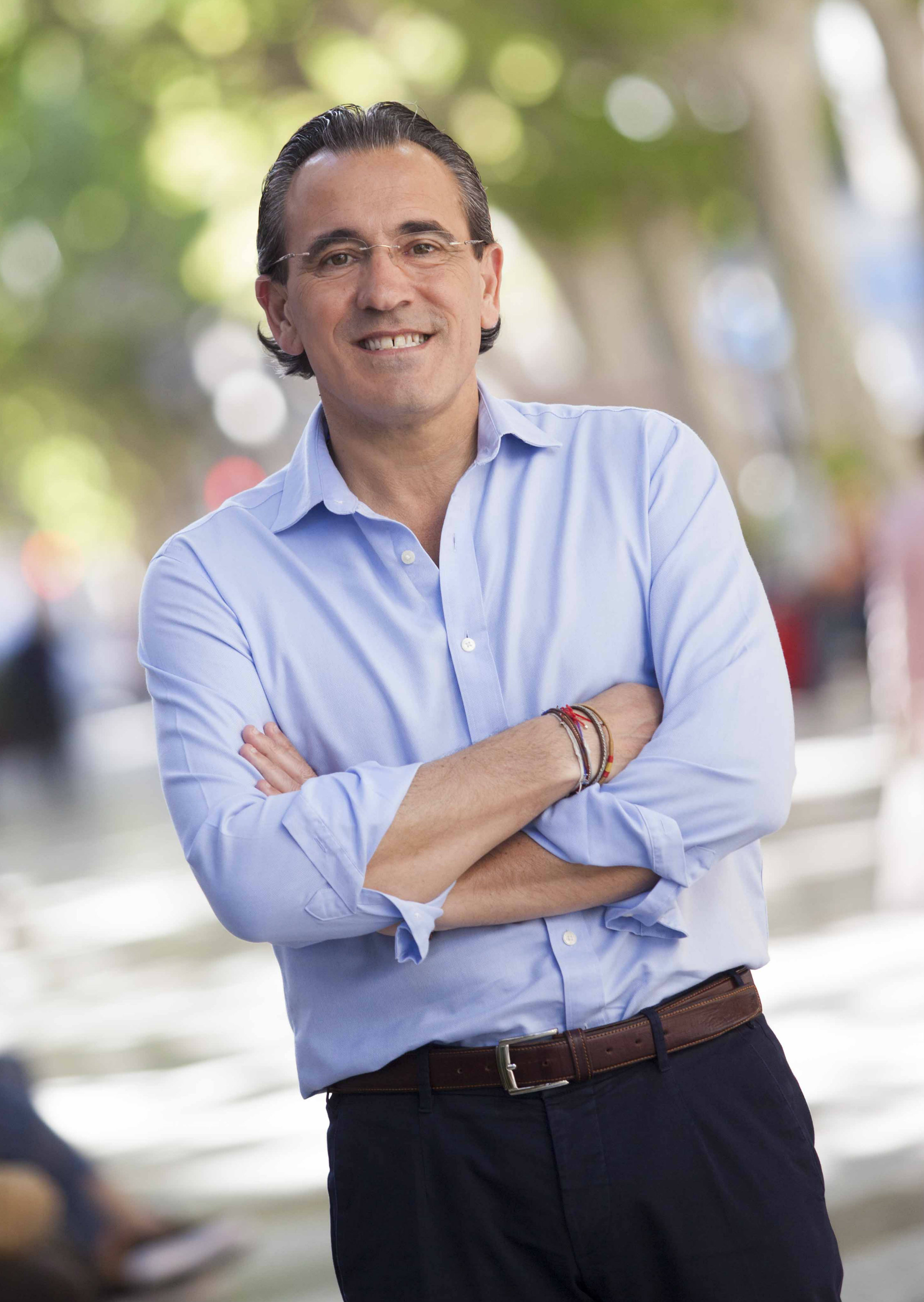 Arturo Torró Chisvert, político y empresario valenciano